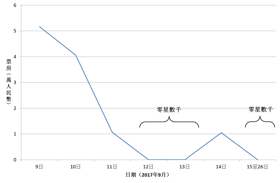 《纯洁心灵·逐梦演艺圈》第二次上映期间的票房